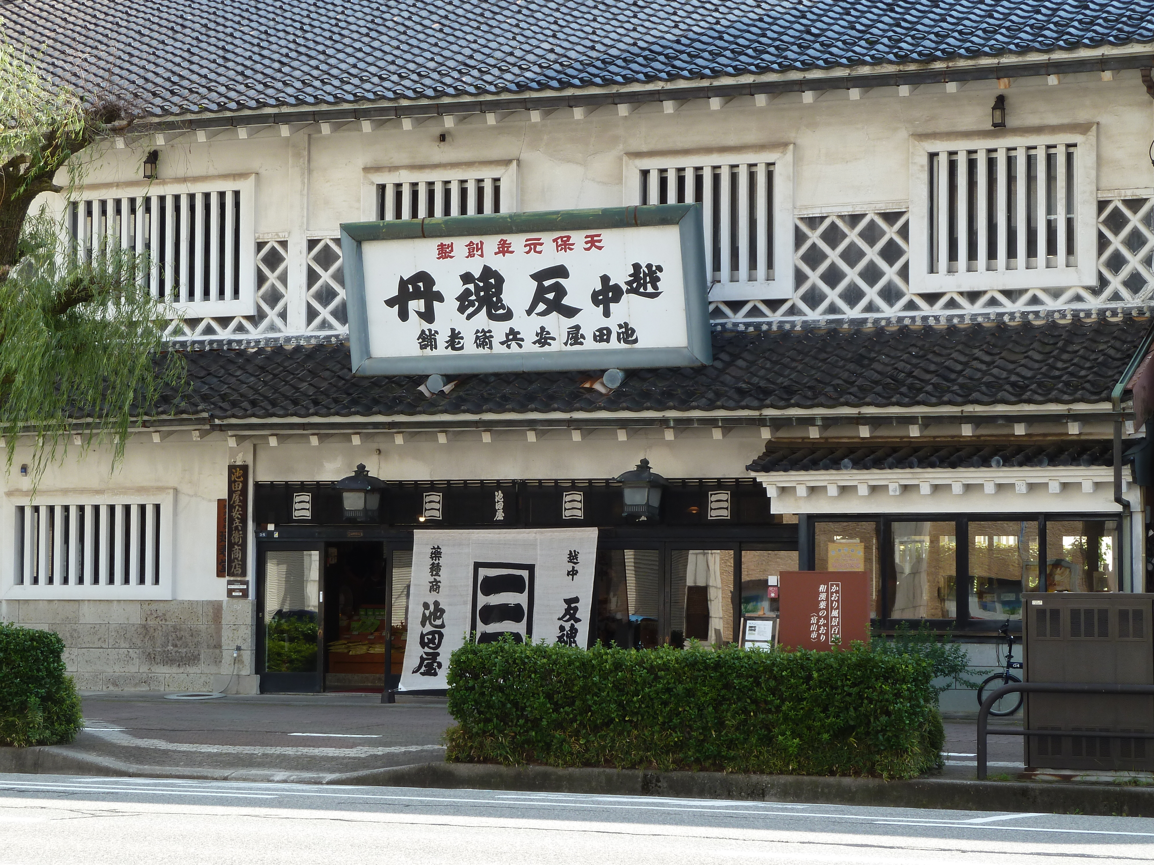 株式会社池田屋安兵衛商店 外観(富山県富山市堤町通り１－３－５)